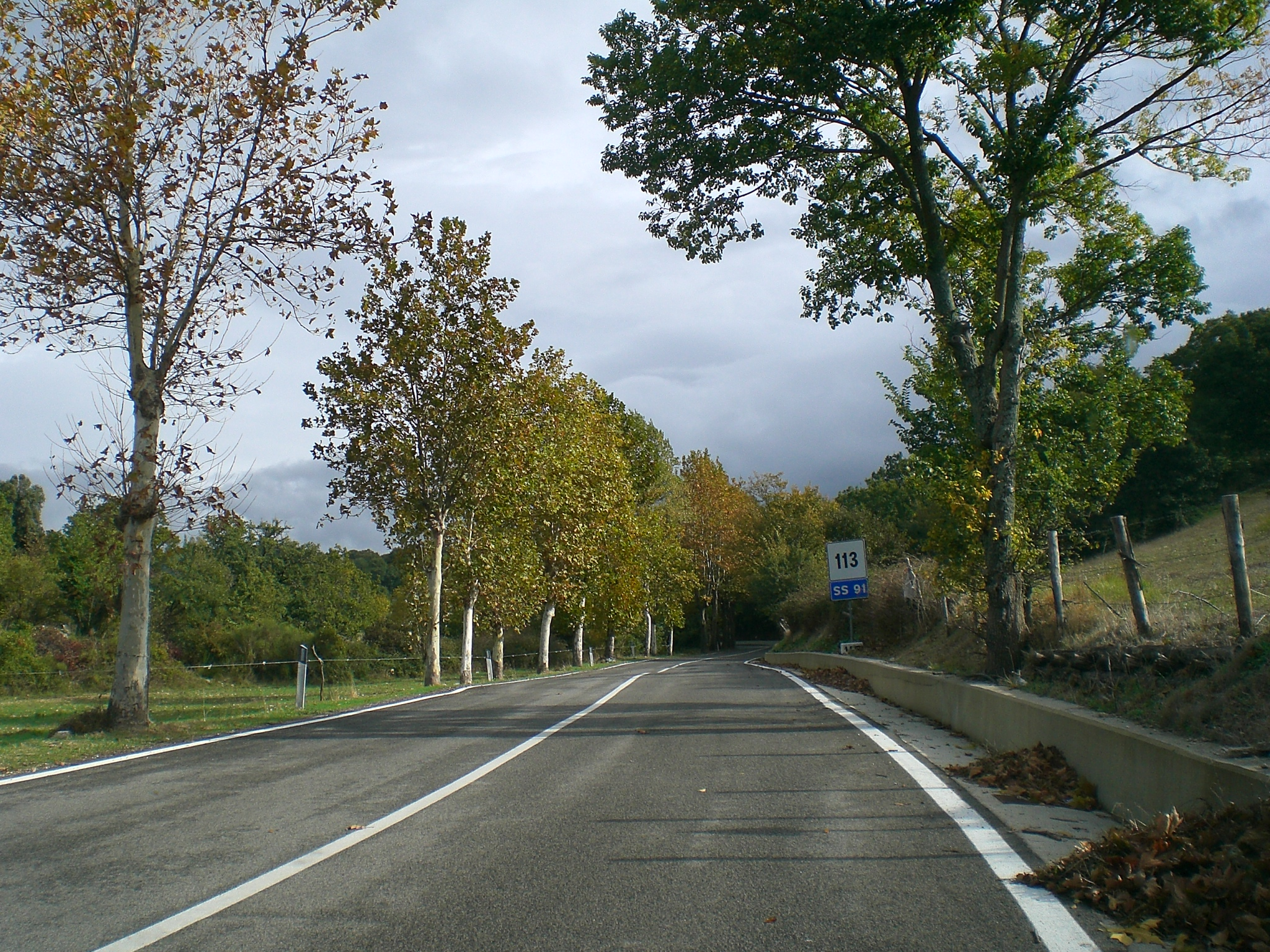 Tratto della strada statale 91 presso la località Saginara